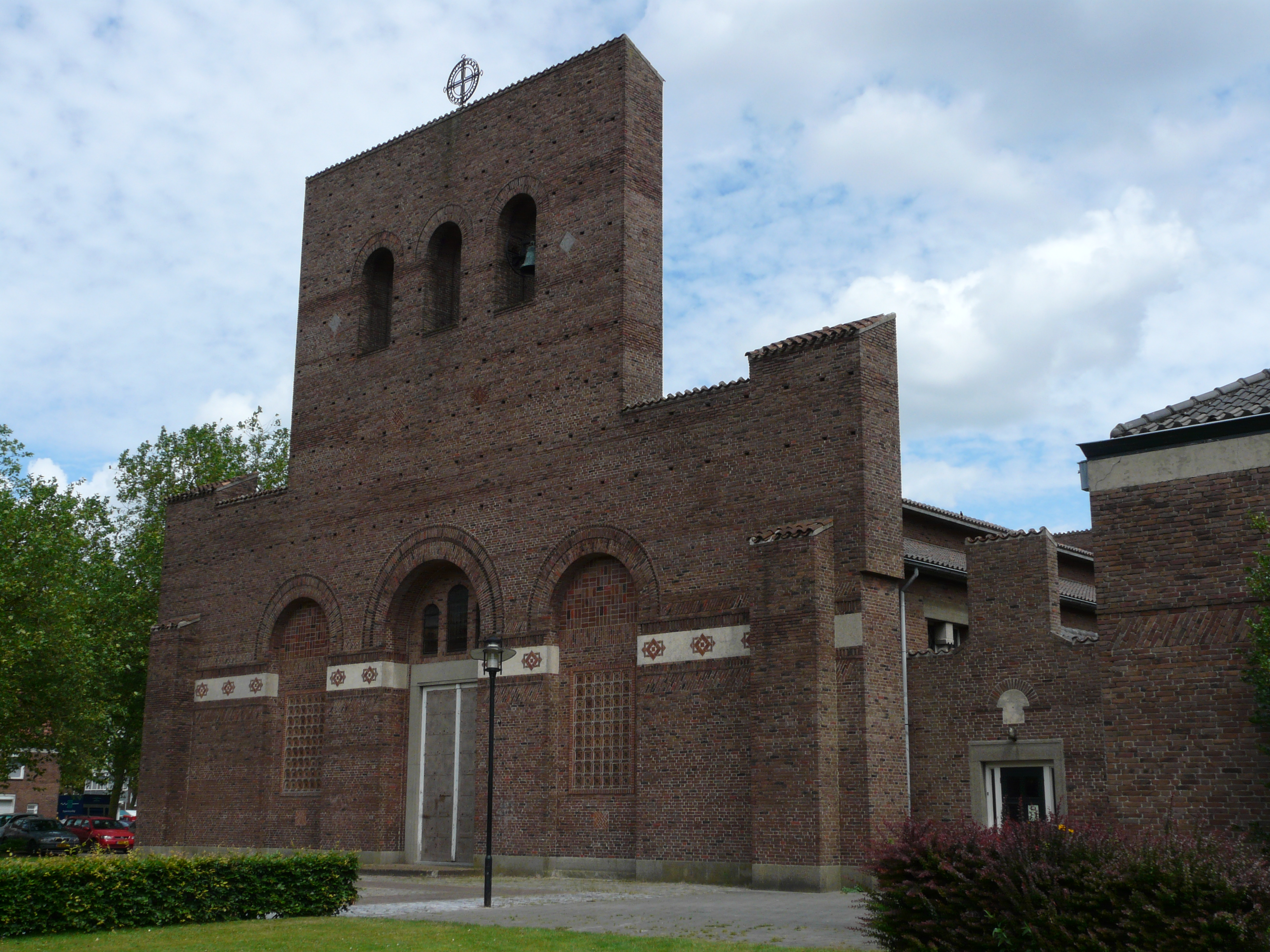 Zicht op een deel van de voormalige Onze-Lieve-Vrouw van Altijddurende Bijstand (Breda), een kerk in de wijk Heuvel (Breda) in Breda